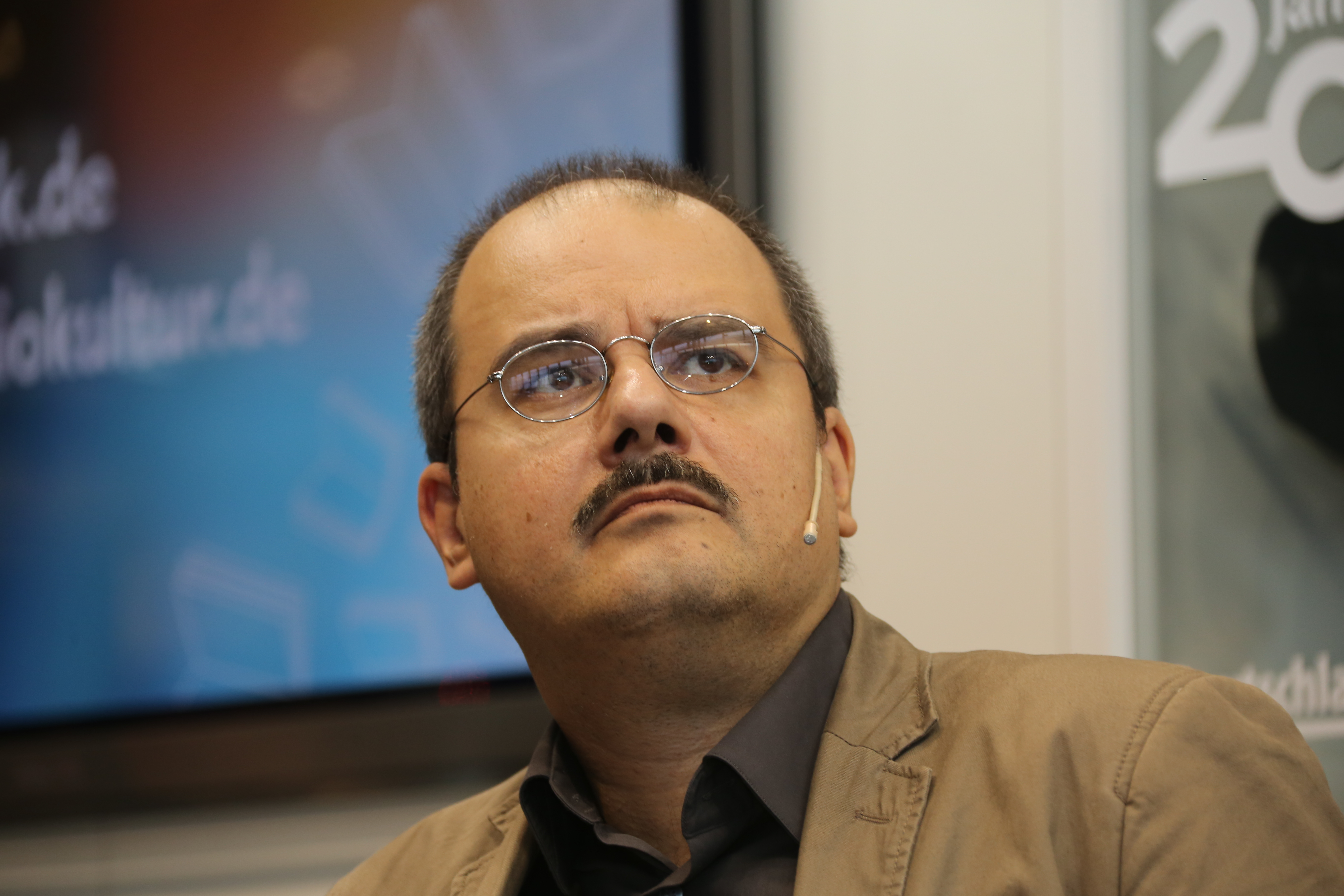 Sherko Fatah